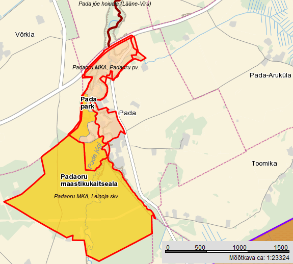 Padaoru MKA kaart. Põhineb Maa-ameti kaardil.